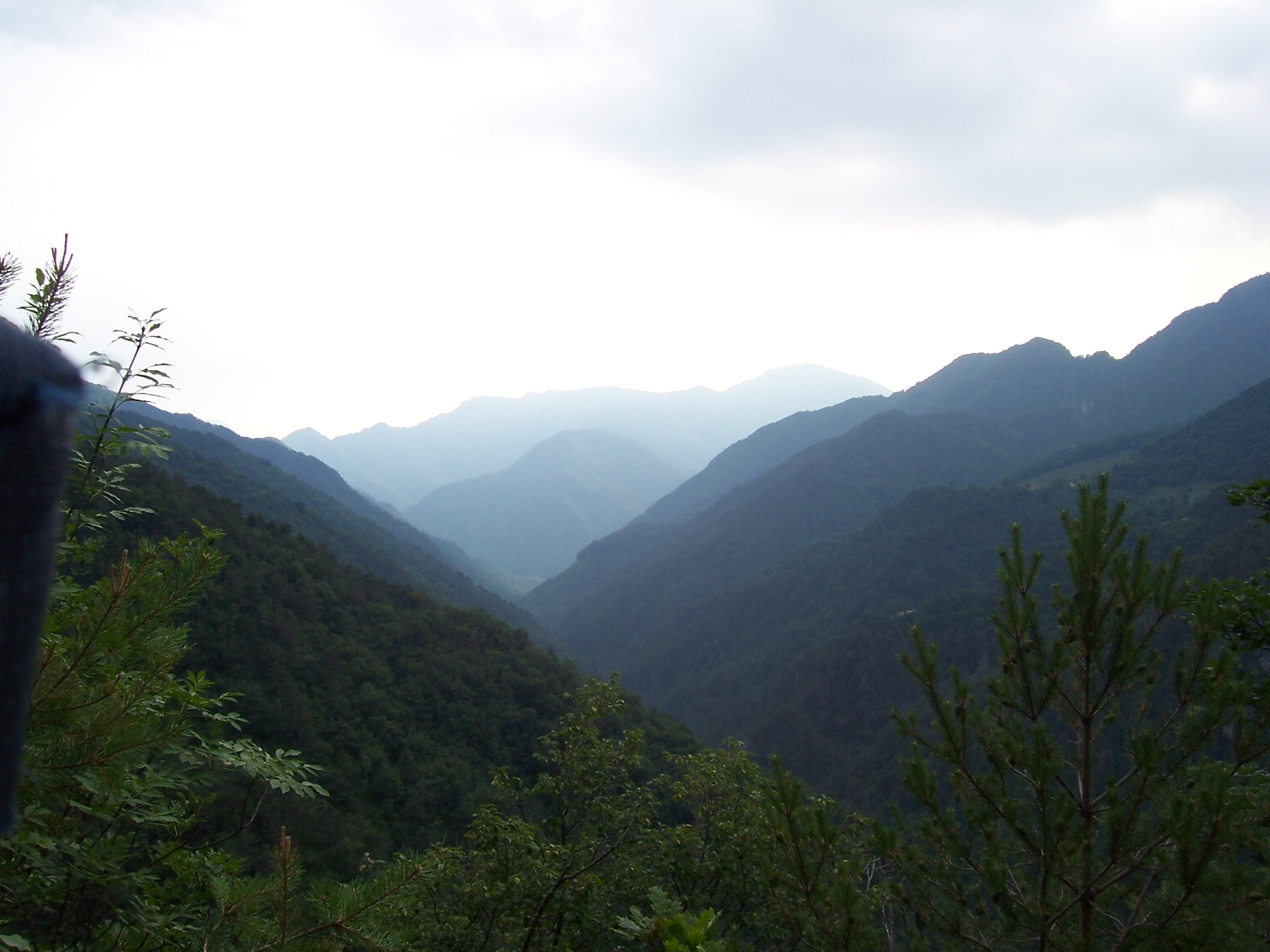 Vallata del Droanello in Valvestino